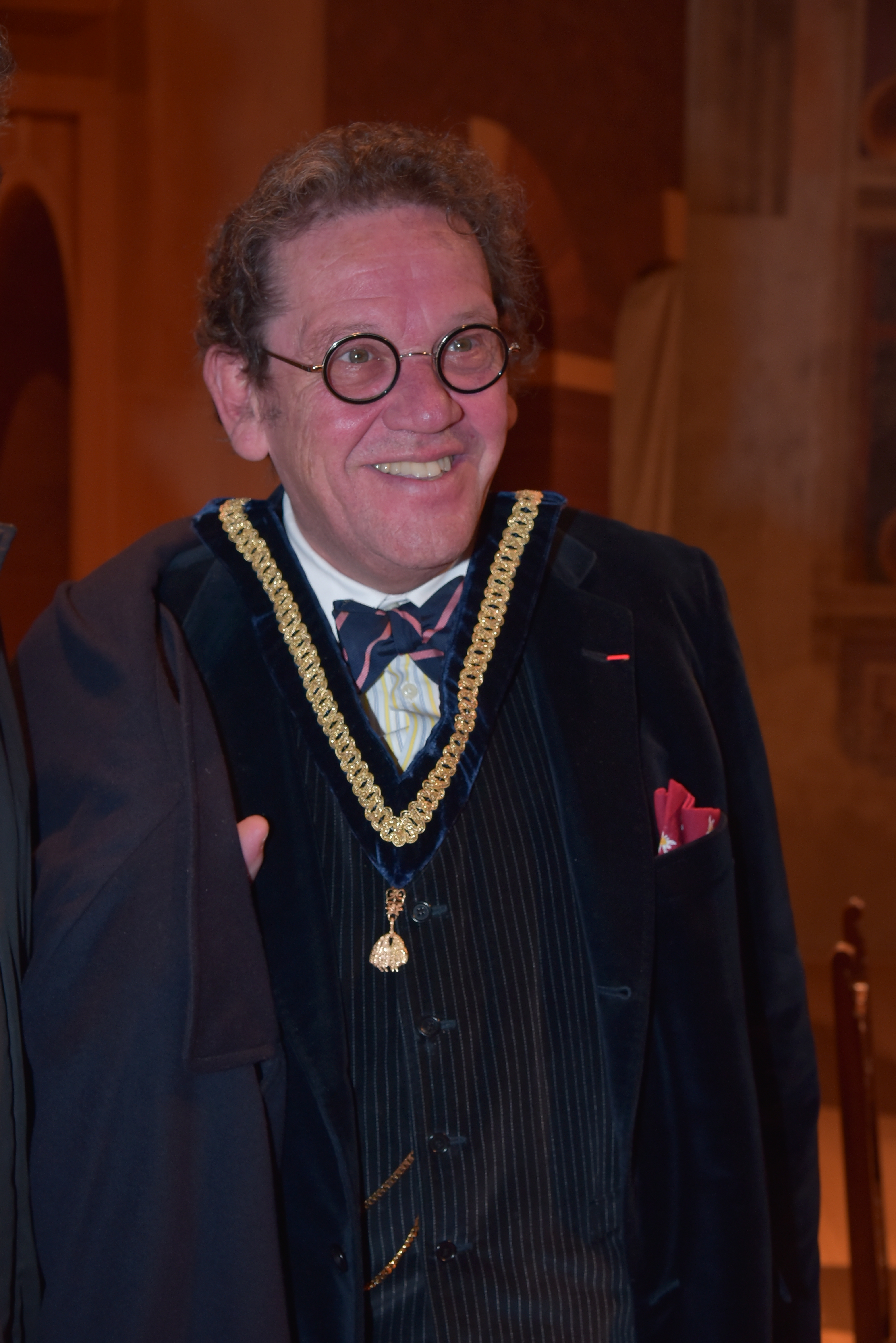 Assegnazione del Premio Nazionale Toson d'Oro di Vespasiano Gonzaga al Prof. Philippe Daverio